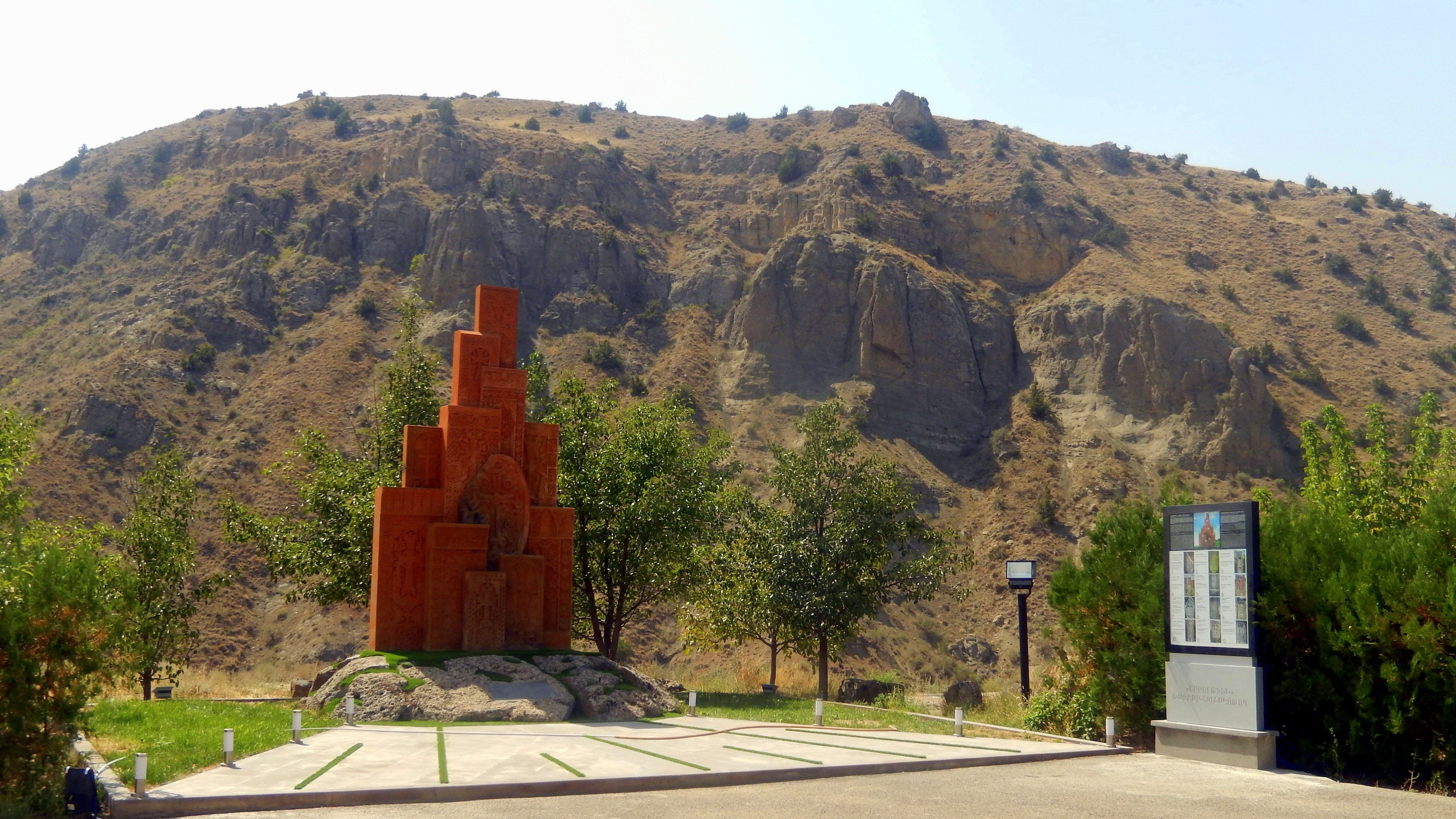 Հարություն խաչքար-հուշակոթող